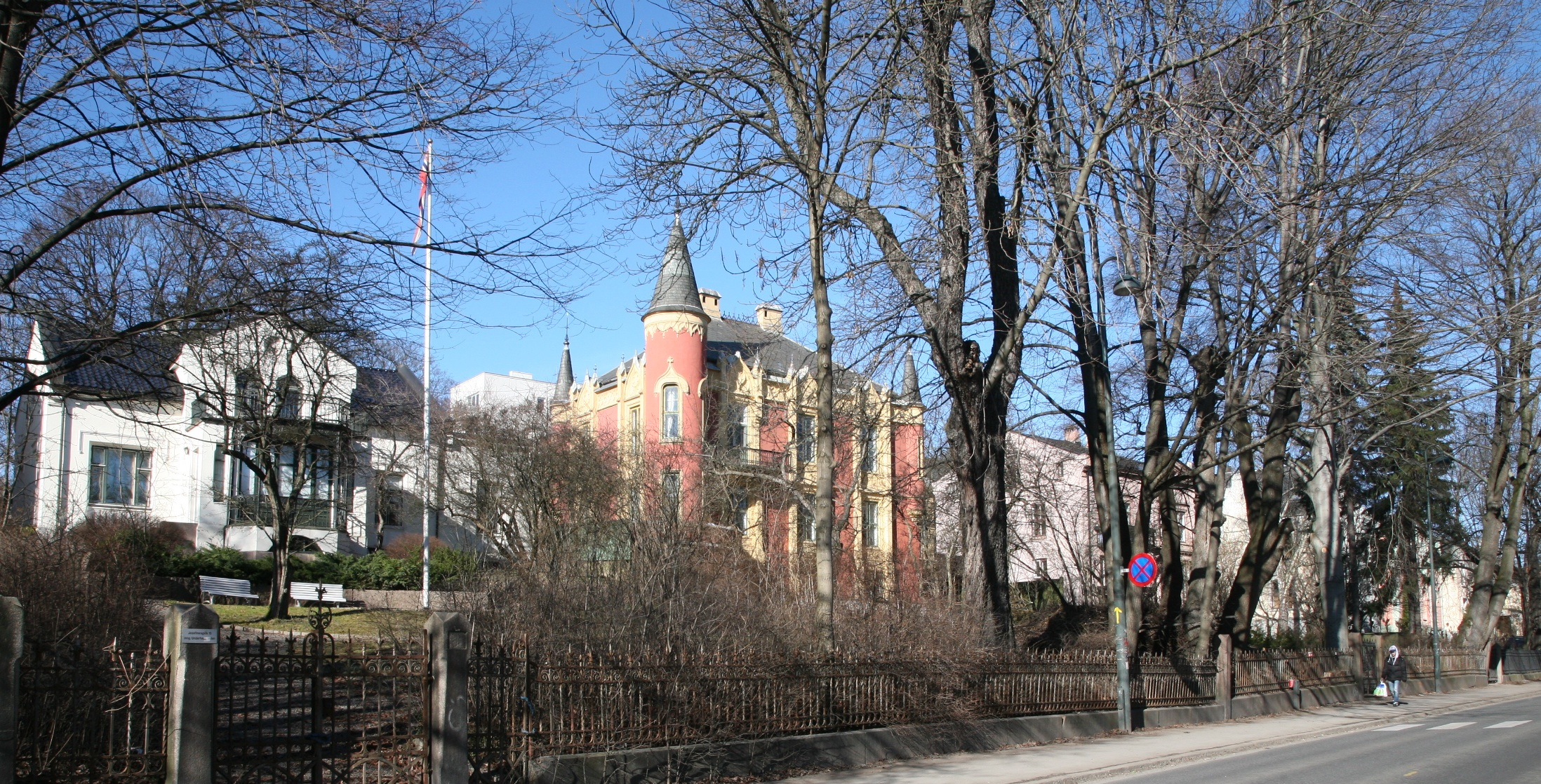 Homannsbyen i Oslo. Josefines gate 15 til venstre, nummer 13 til høyre.